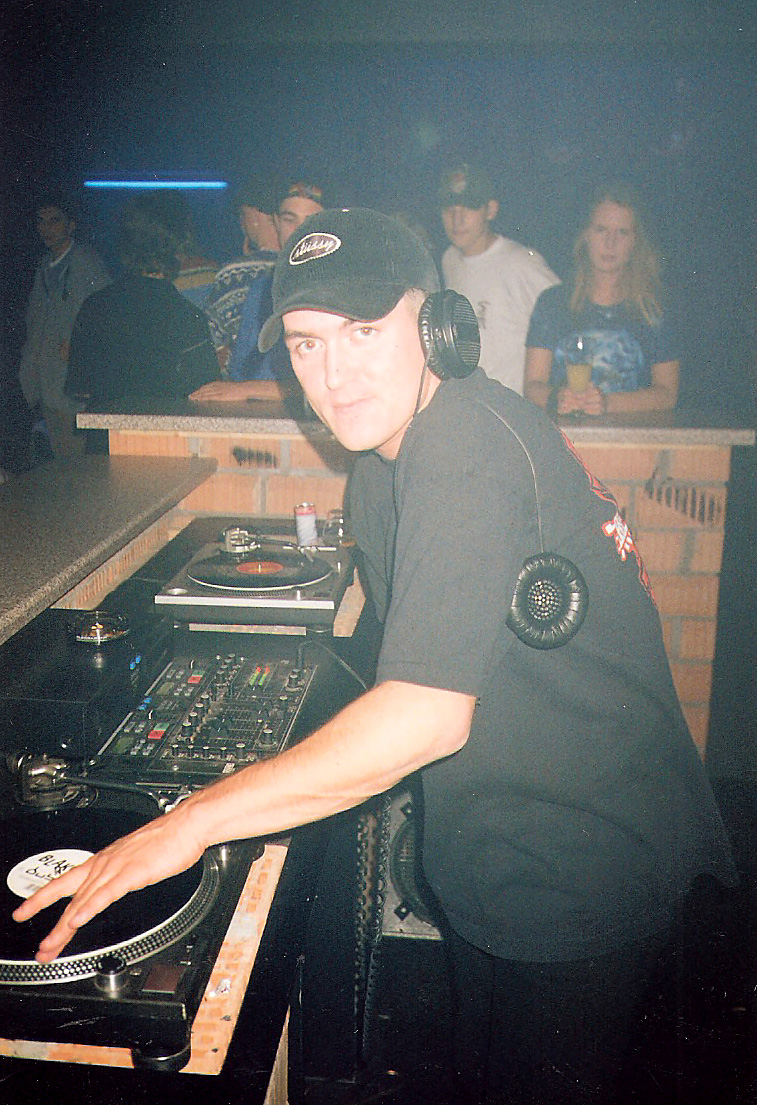 Marc 'Oh während eines Gigs im Octagon-Club 1994, im Hintergrund seine Freundin